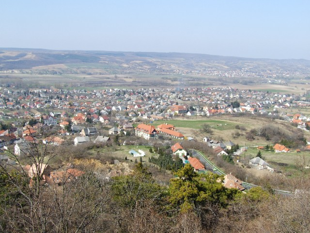 Pannonhalma látképe az apátság felől nézve